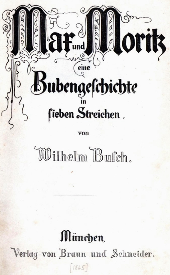 Erste Seite der Erstausgabe von Max und Moritz; einer Bildergeschichte von Wilhelm Busch; leicht beschnitten.